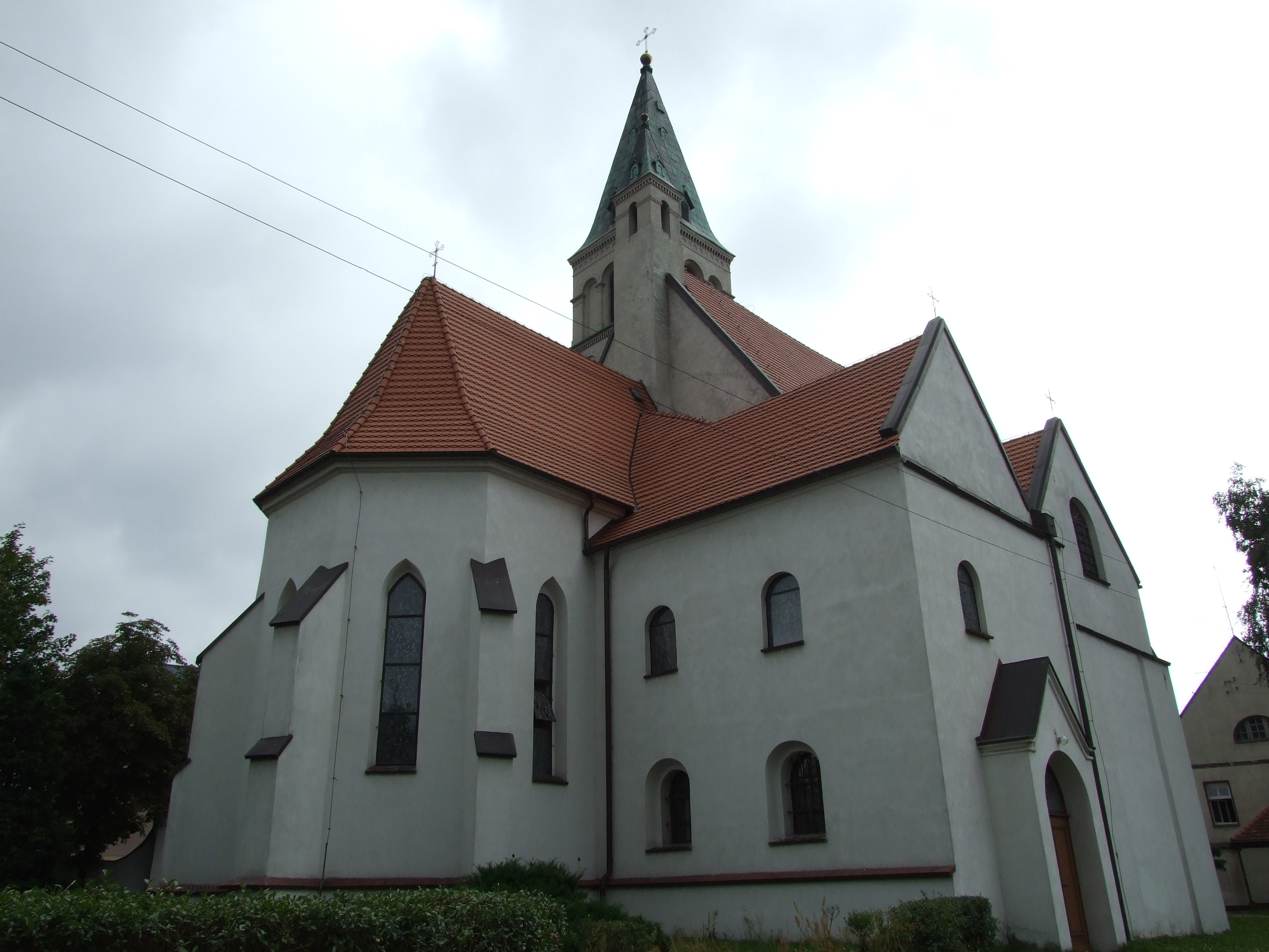 Kościół św. Michała w Oleśnie